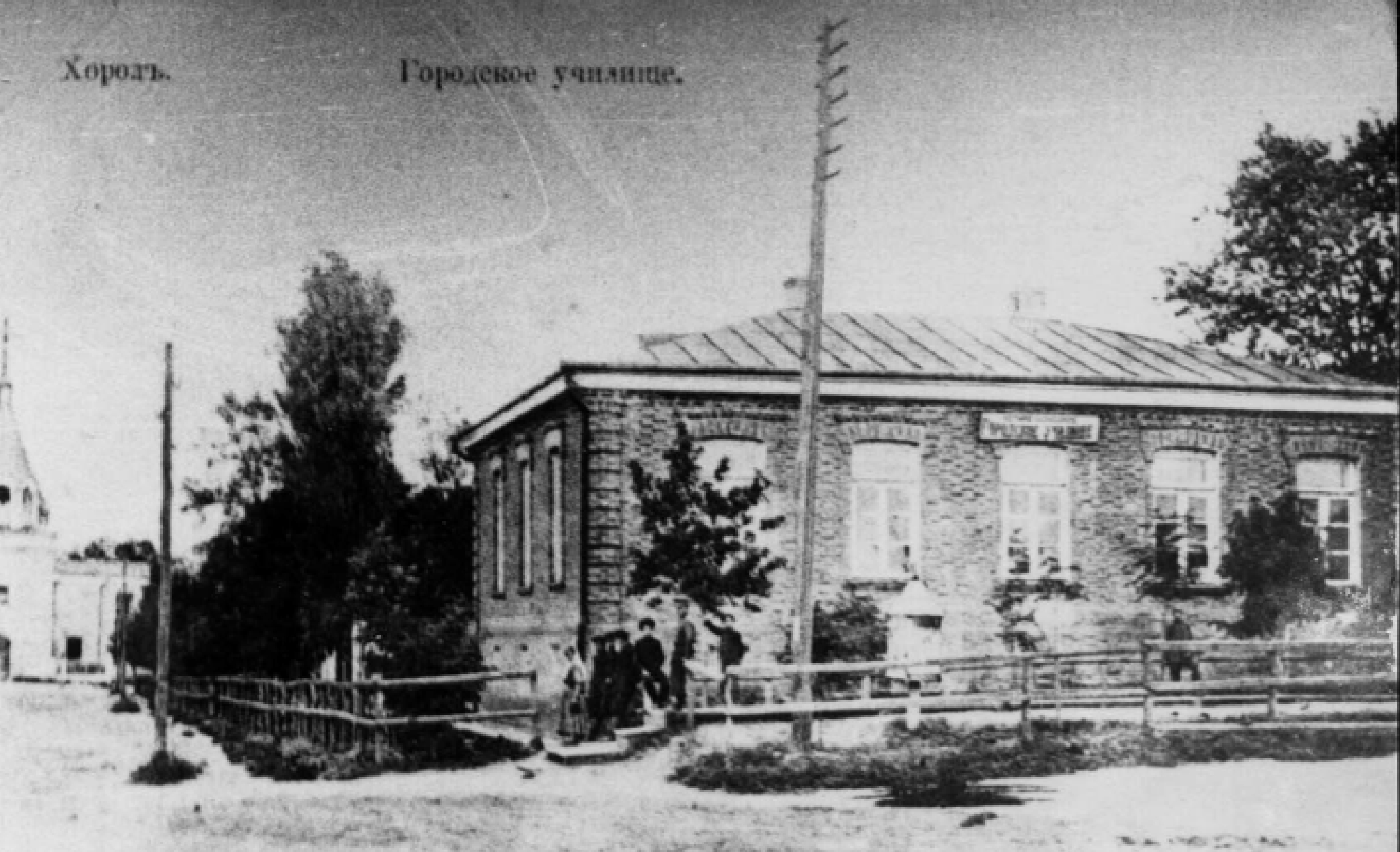 фото Хорольського повітового училища, яке в 1875 р. було реорганізоване в міське училище. Поштова листівка, 1912 р.